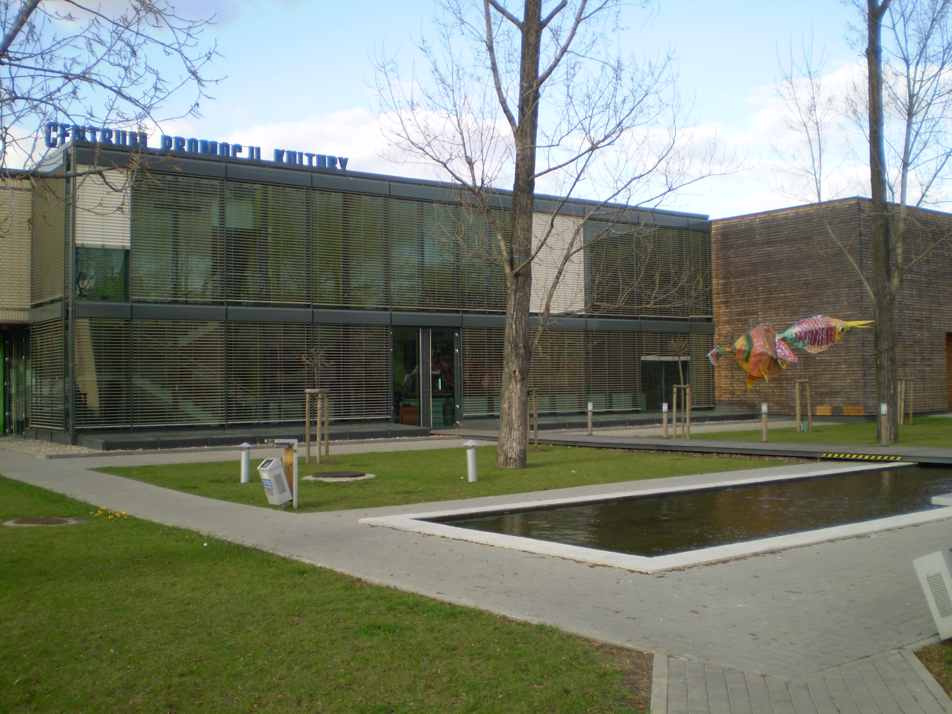 Centrum Promocji Kultury w dzielnicy Praga Południe m.st. Warszawy, ul. Podskarbińska 2